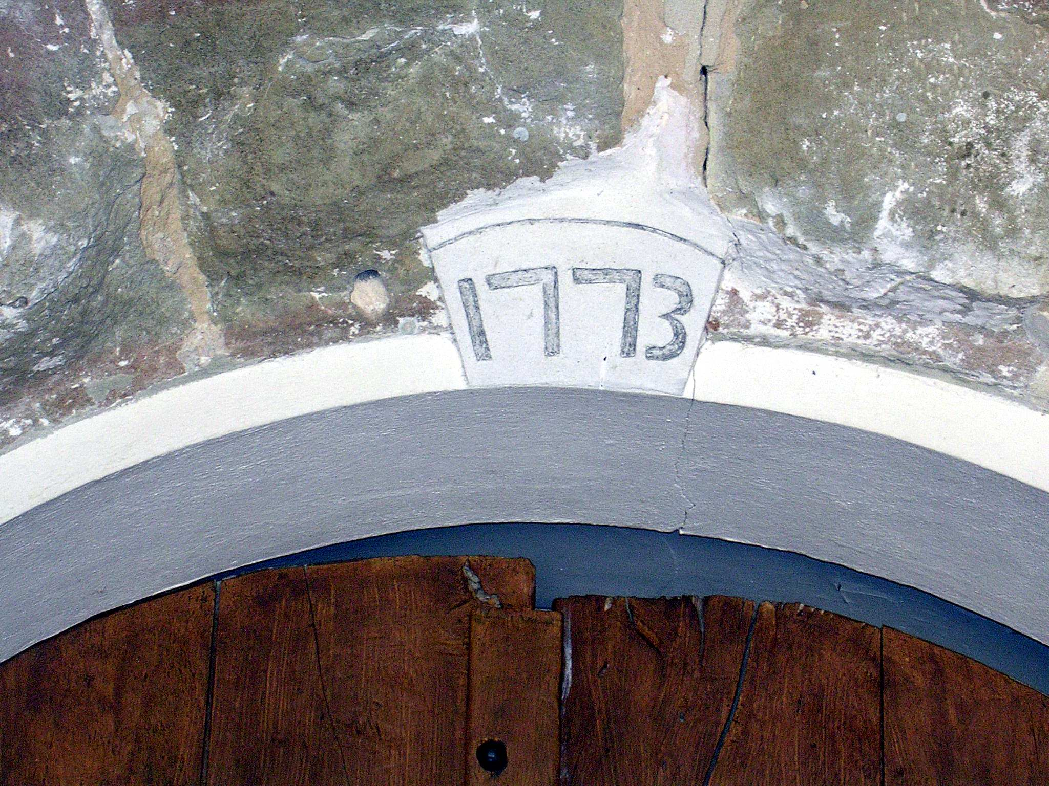 Notre-Dame de la Course Landaise, date au-dessus de la porte d'entrée